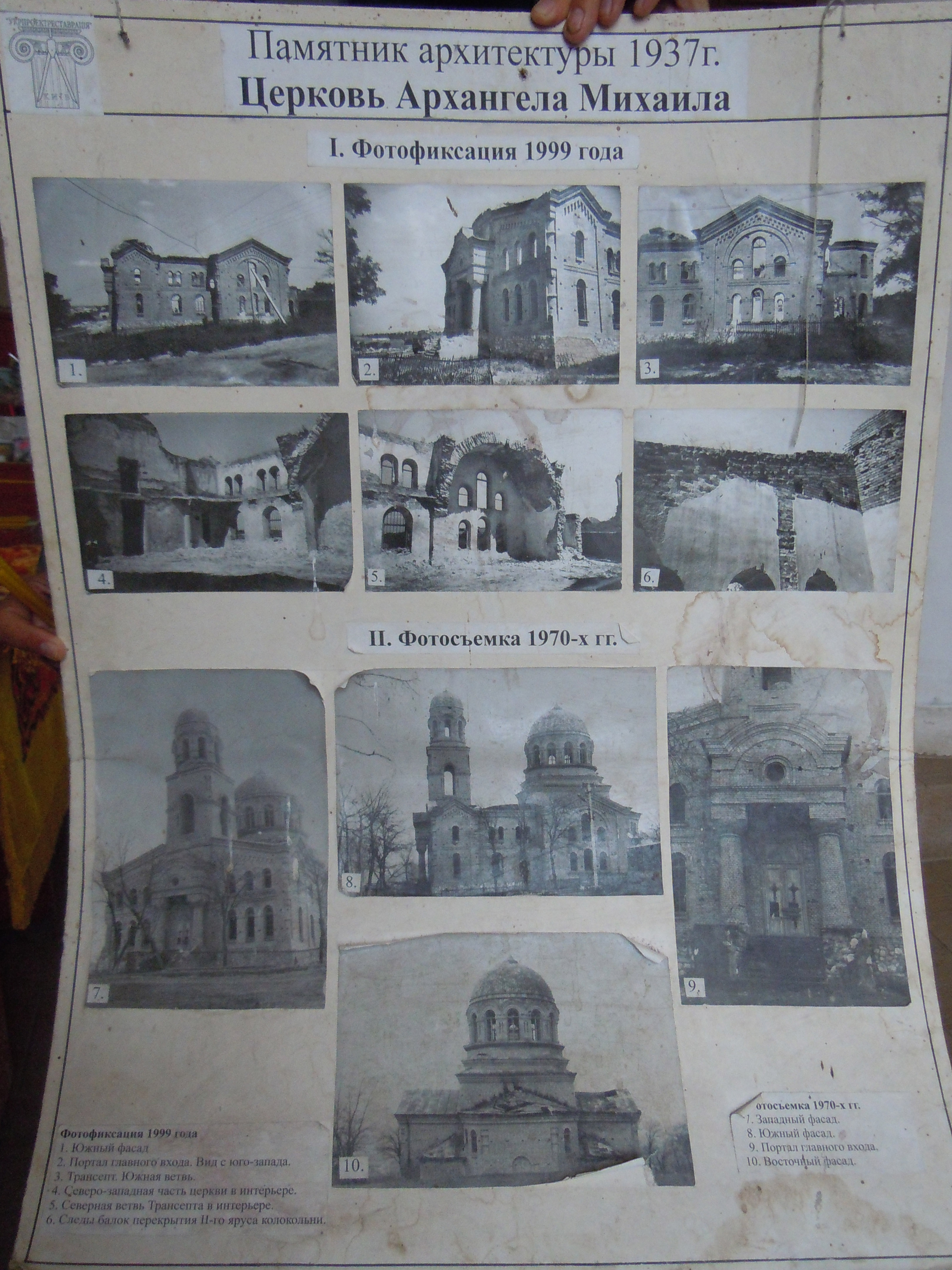 Церква, с. Криничне, Ювілейна вул.